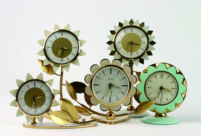 Wecker in Form einer Blume, Kaiser, Villingen, 1960er Jahre, Deutsches Uhrenmuseum, Inv. 16-4215-3